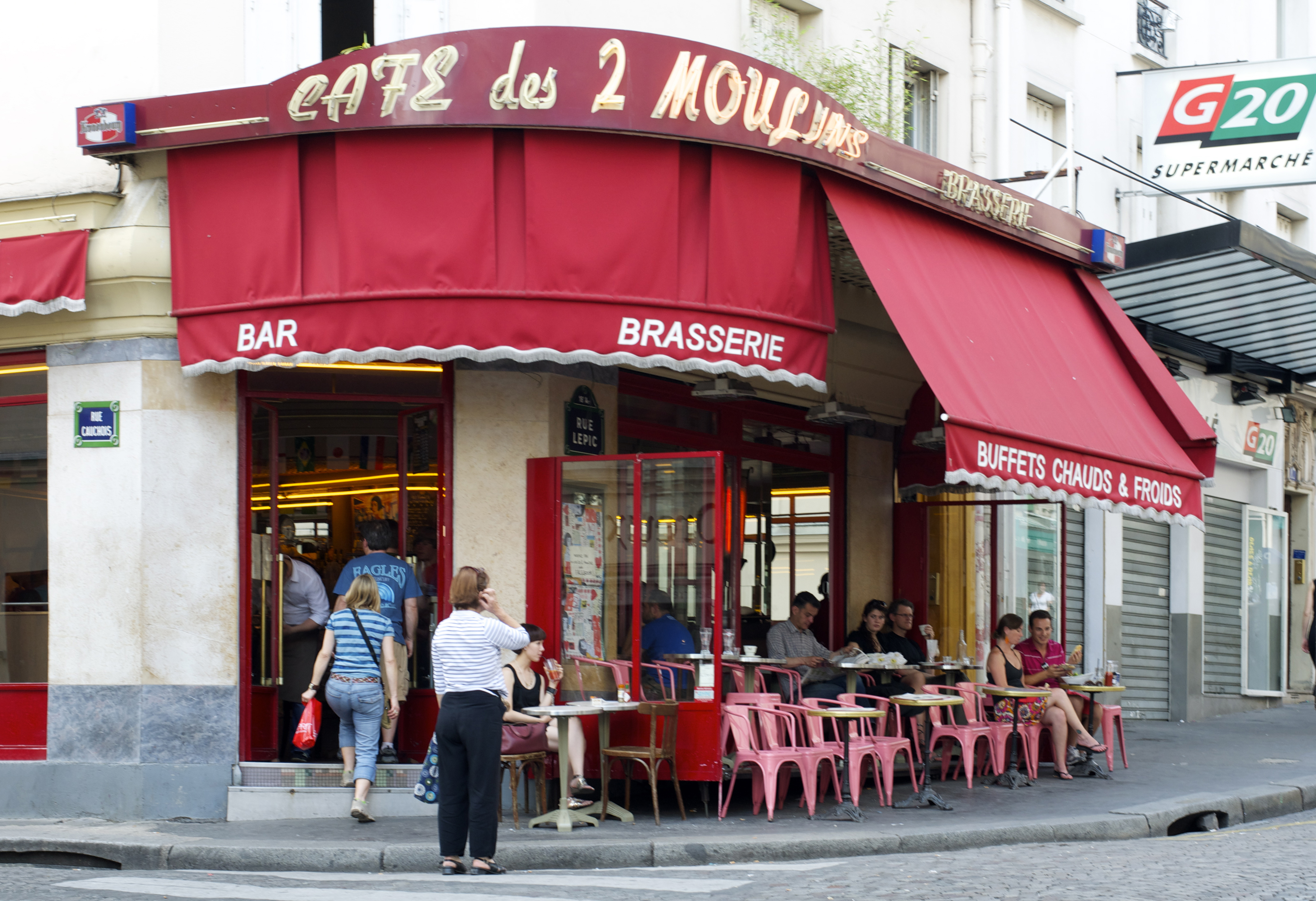 Café des Deux Moulins, 15 Rue Lepic, 75018 Paris, France.